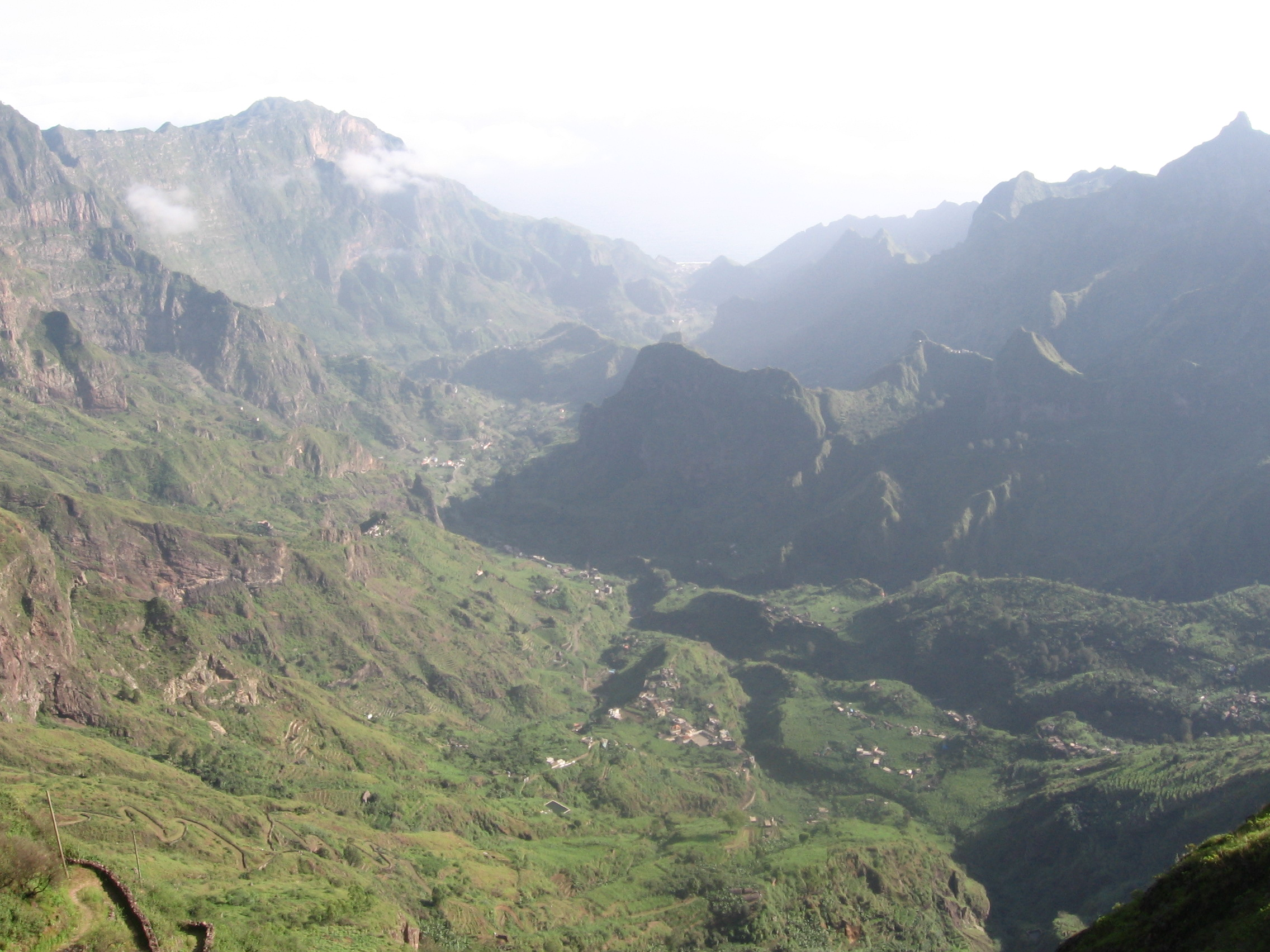 Vista geral do vale da ribeira do Paul desde o bordo da Cova. Santo Antão. Cabo Verde